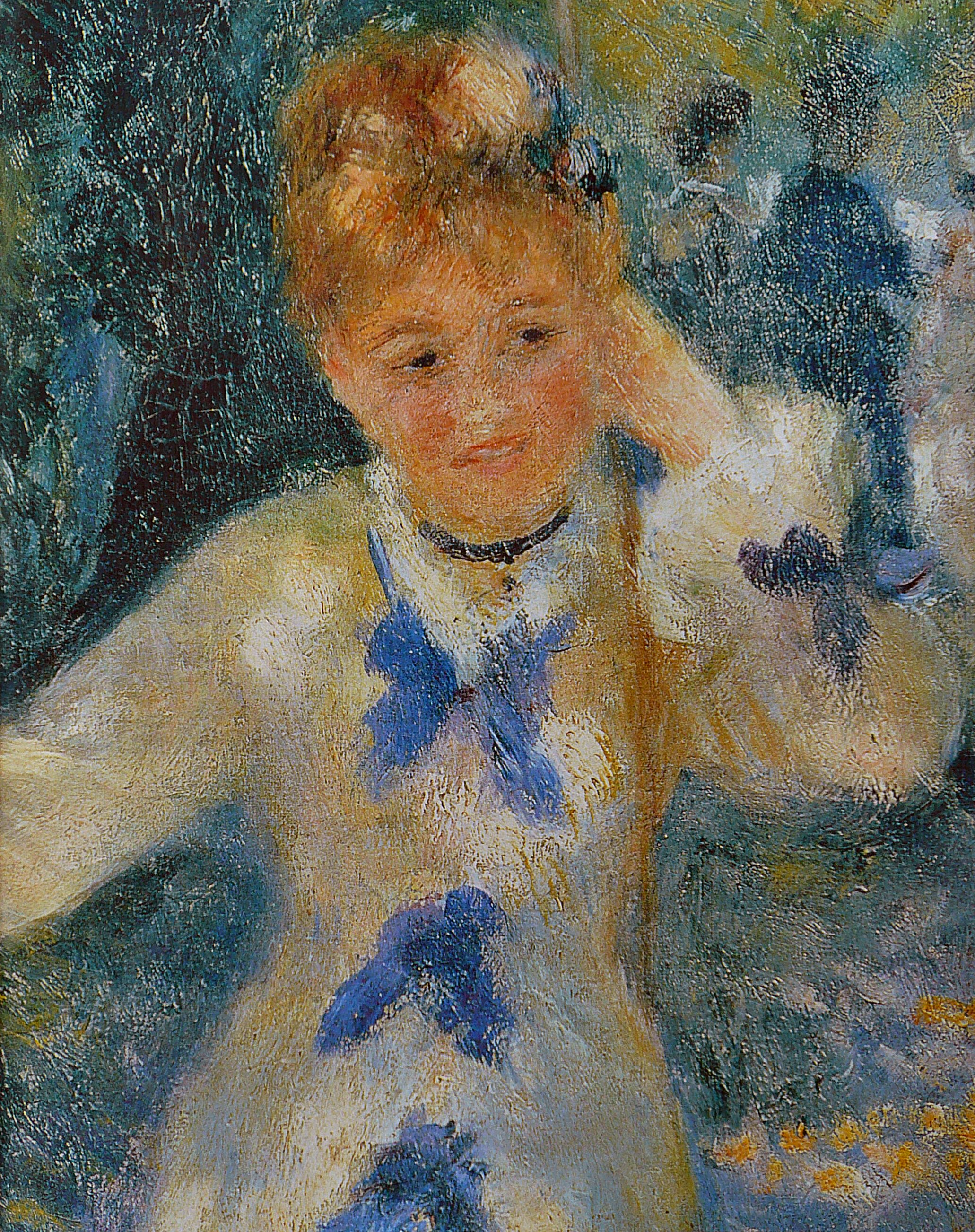 La Balançoire